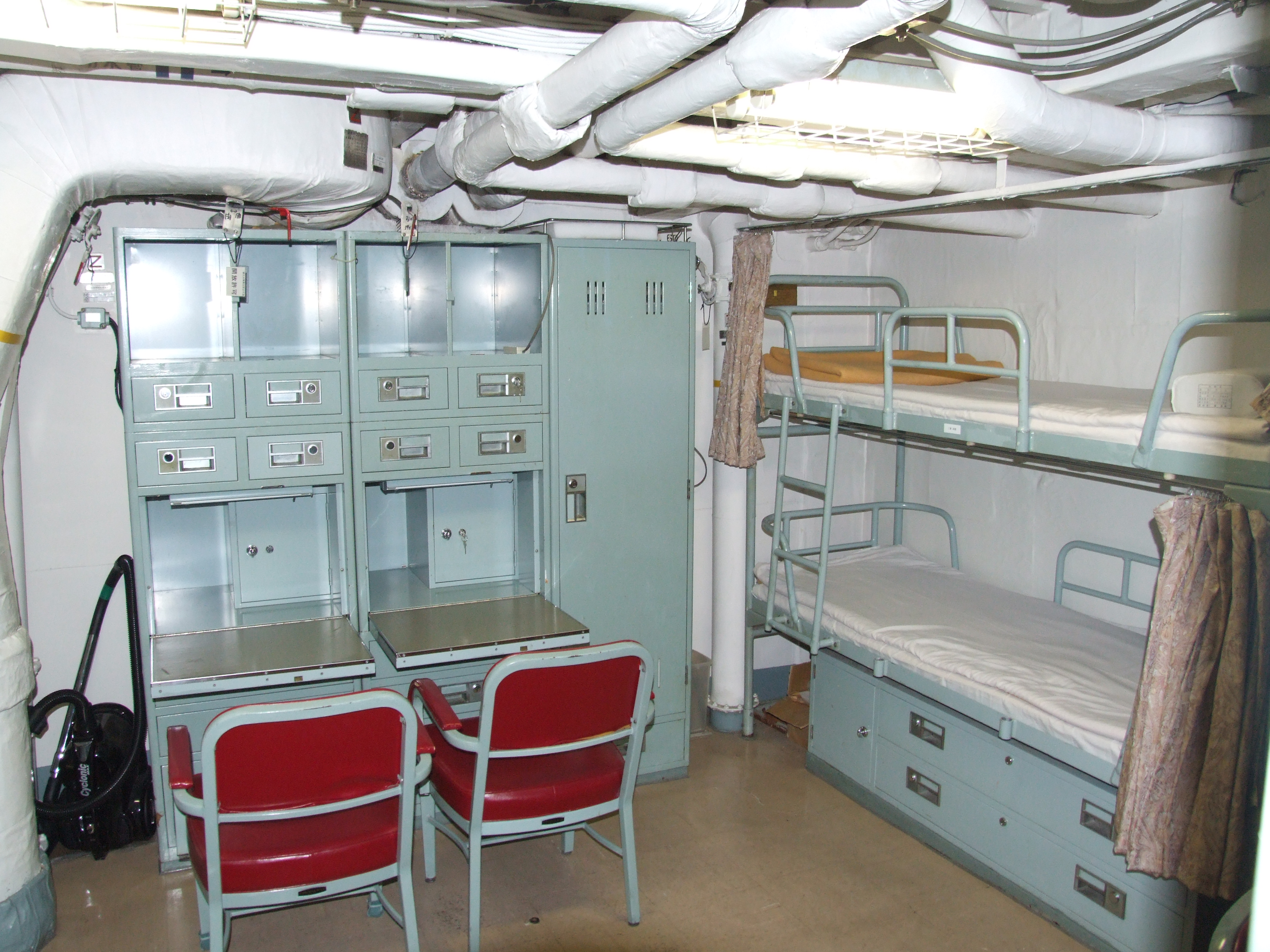 護衛艦しらゆきの居住スペース。横浜港開港150年の艦内開放にて撮影。 Fujifilm FinePix S9000